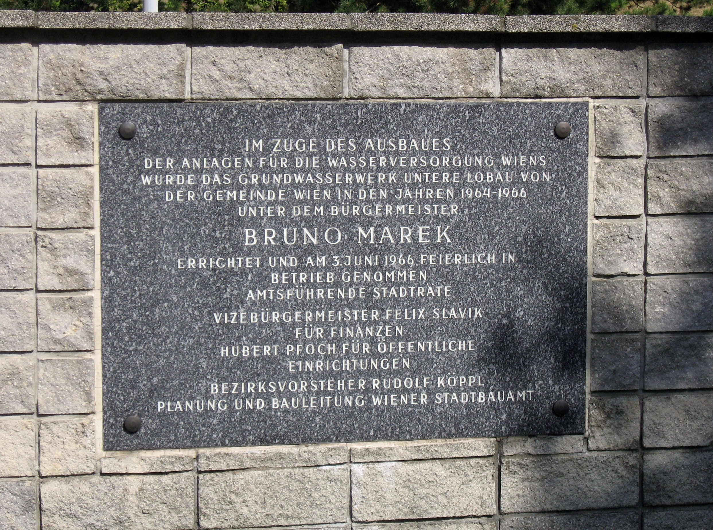 Informationstafel beim Eingang des Grundwasserwerks Lobau in Wien Donaustadt